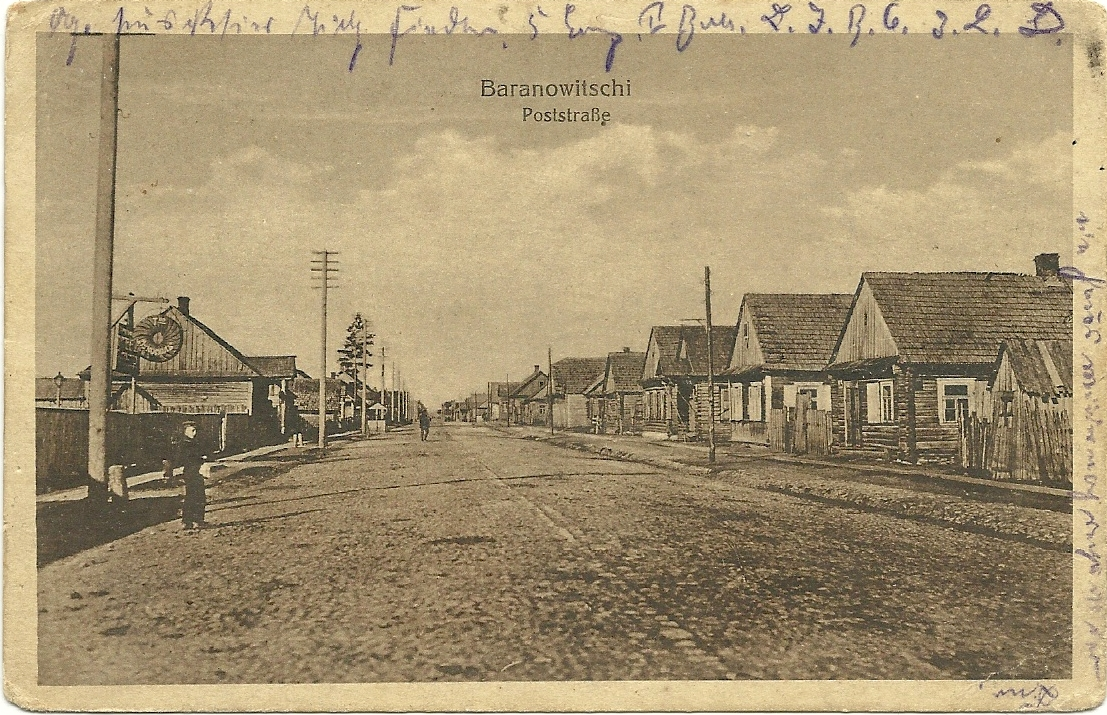 Alte Postkarte von 1916, Old Postcard, 1916